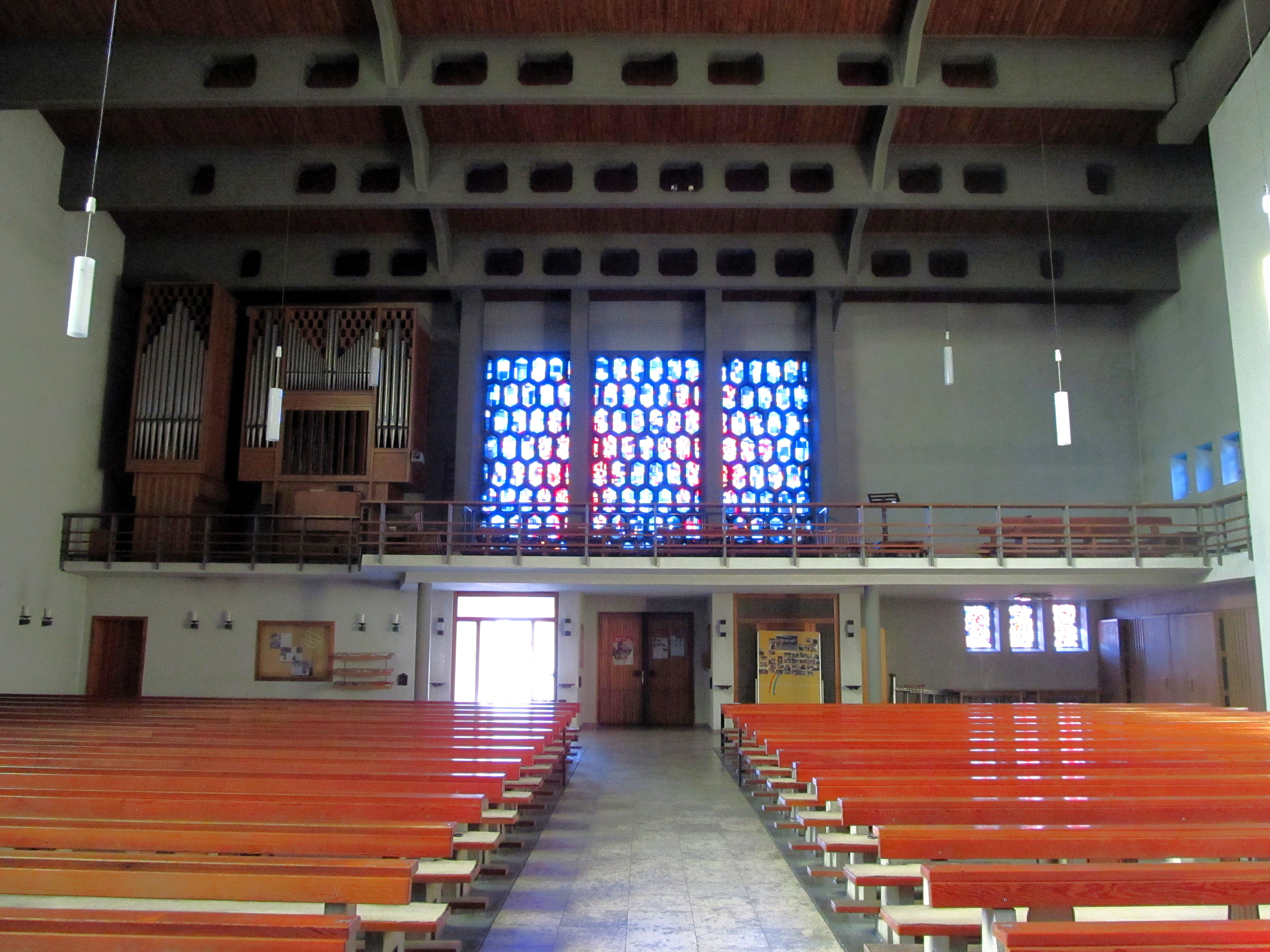 Blick ins Innere der katholischen Pfarrkirche St. Mauritius in Lautzkirchen, Blieskastel, Saarland